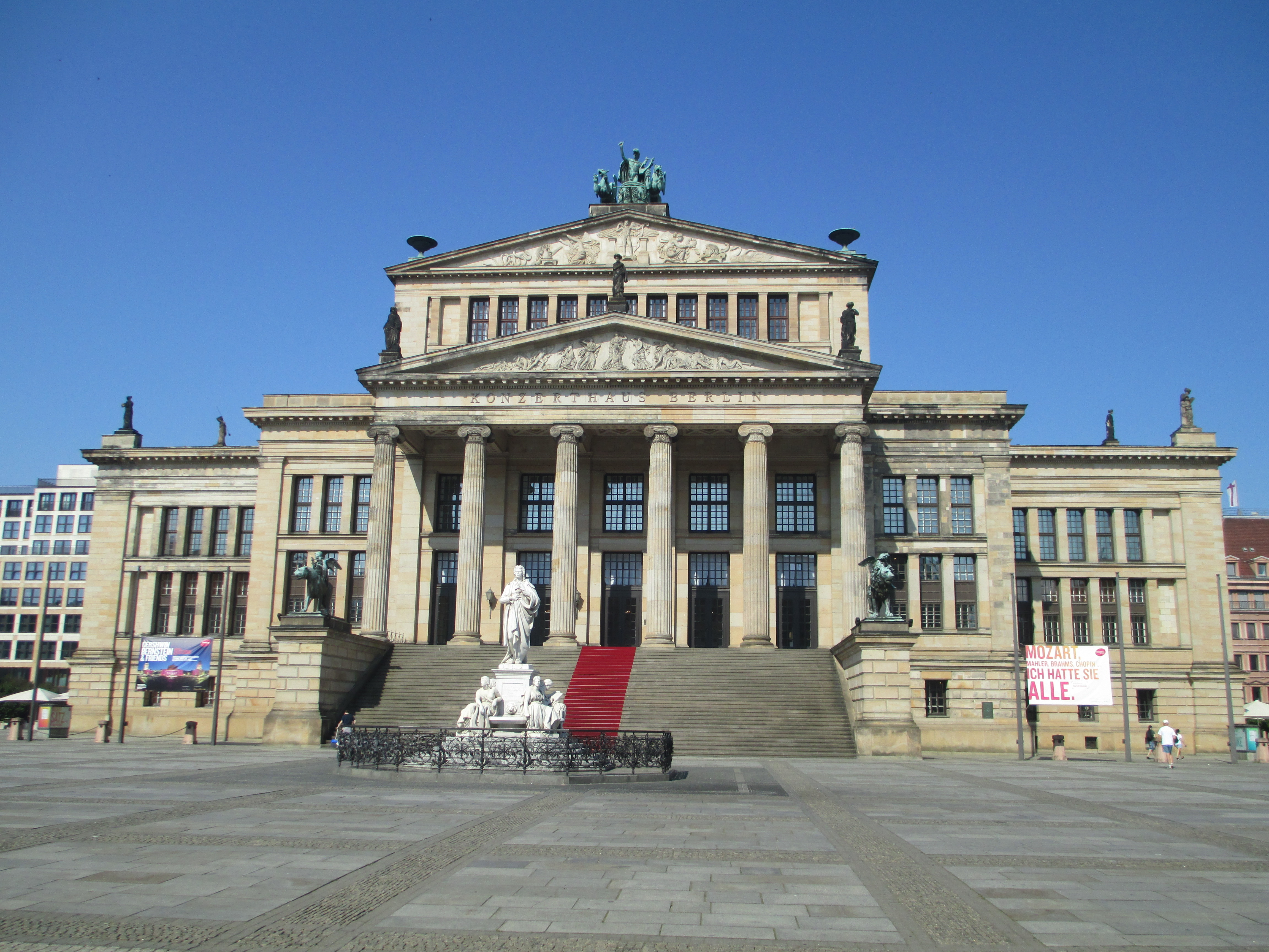 בית הקונצרטים בז'נדארמנמארקט בברלין